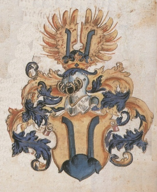 Wappen Philipp Eisenberger der Jüngere (1548-1607) Verfasser der Chronik Eisenberger